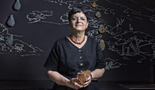 פרופסור לארכיאולוגיה נעמה גורן ענבר